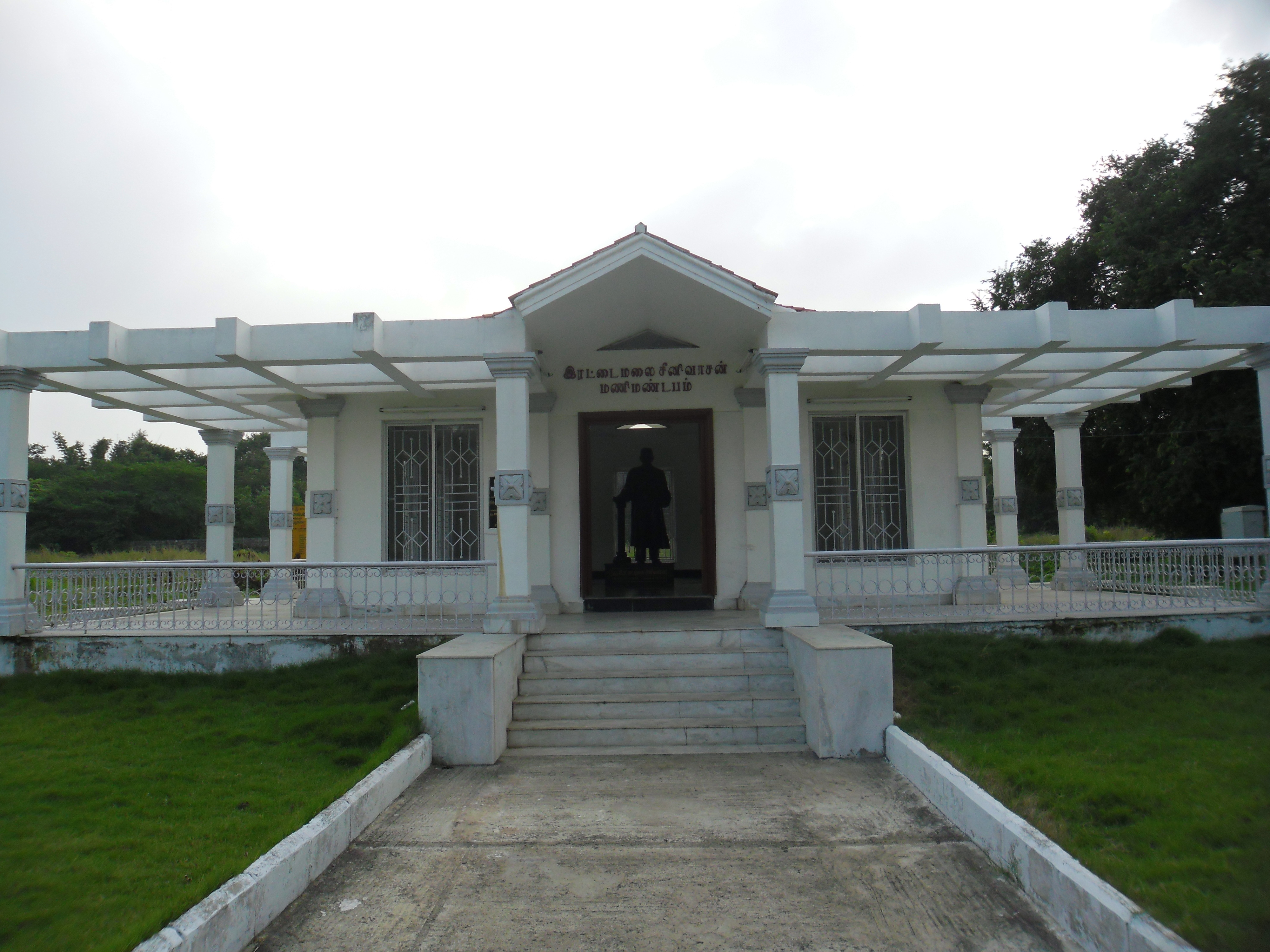 இரட்டைமலை சீனிவாசன் நினைவிடம், சென்னை, காந்திமண்டபம்